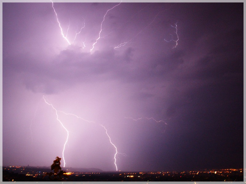 Coup de foudre bifide capturé lors d'un orage sur la ville de Lyon. La photo est prise depuis la Basilique de Fourvière.